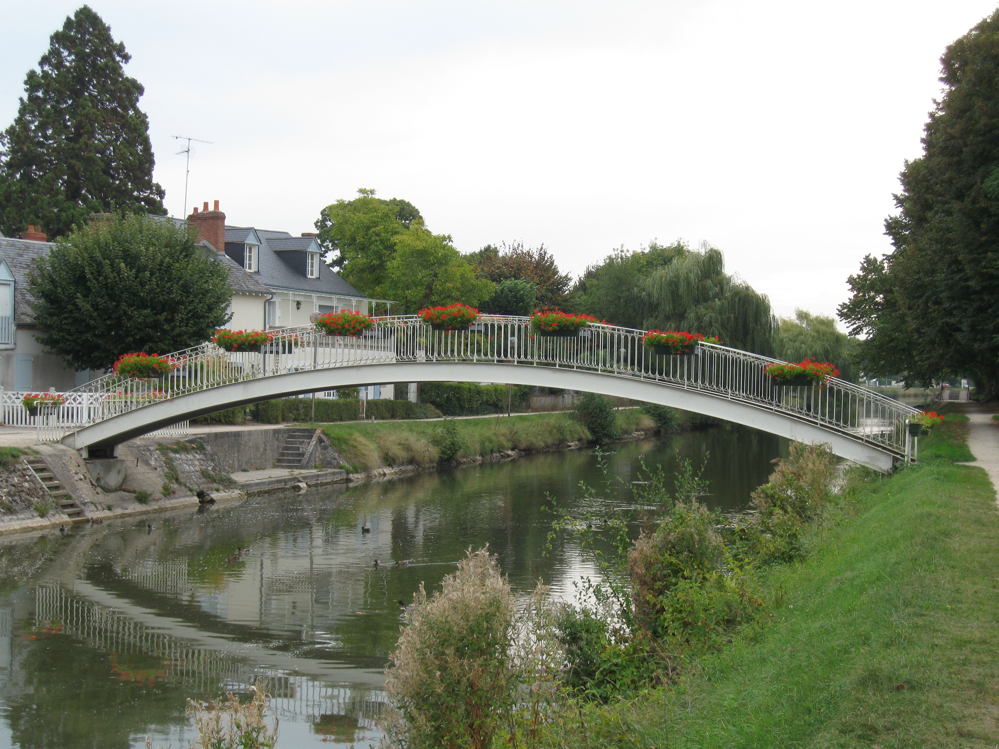 Pont sur le canal d'Orléans, Combleux, Loiret, France